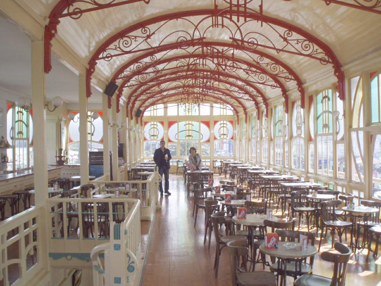 Con Toño y Loly